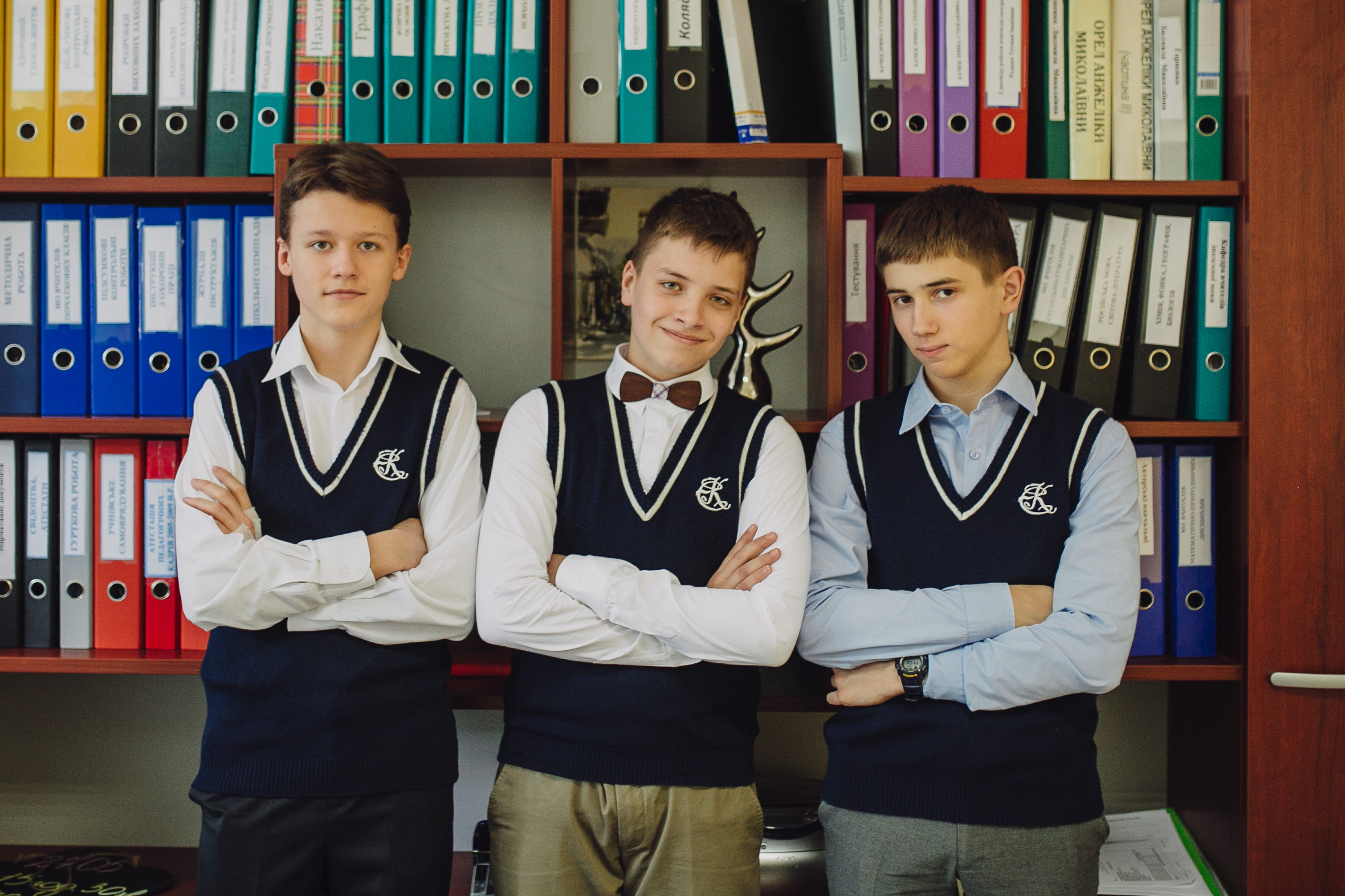 учні